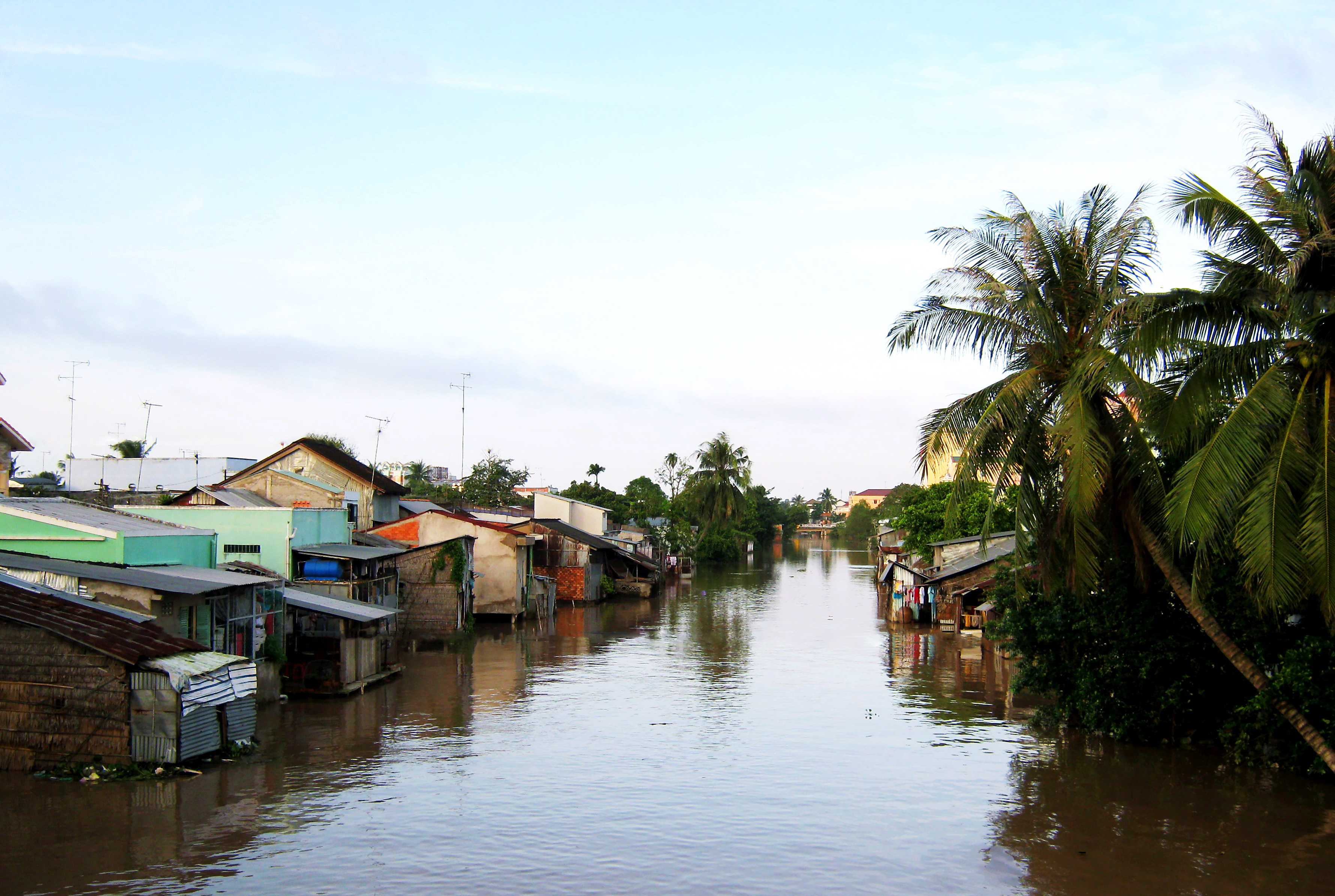 Rạch Cầu Lầu (ăn thông với sông Long Hồ), thế cho hào thành phía Đông (mặt trước) của thành Vĩnh Long xưa, đồng thời là một thủy lộ để ra vào thành. Nối hai bờ rạch là Cầu Lầu (cầu có dựng lầu cao làm nơi canh gác). Bờ phải con rạch, là xóm Lò Rèn thời nhà Nguyễn.